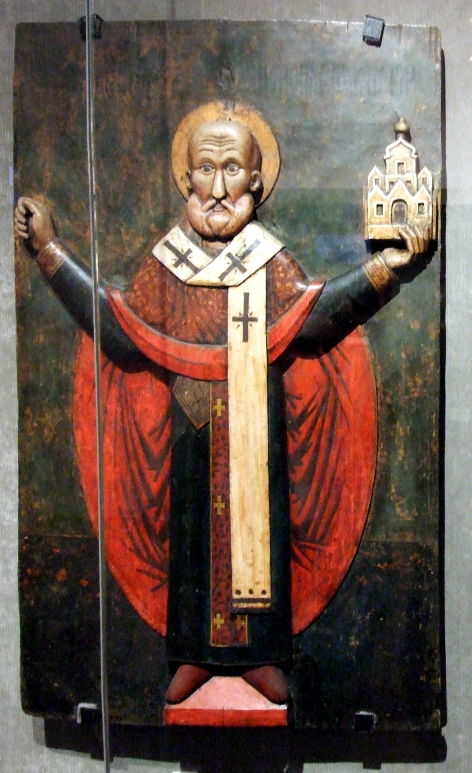 Святой Николай. К. 17 - нач. 18 в.